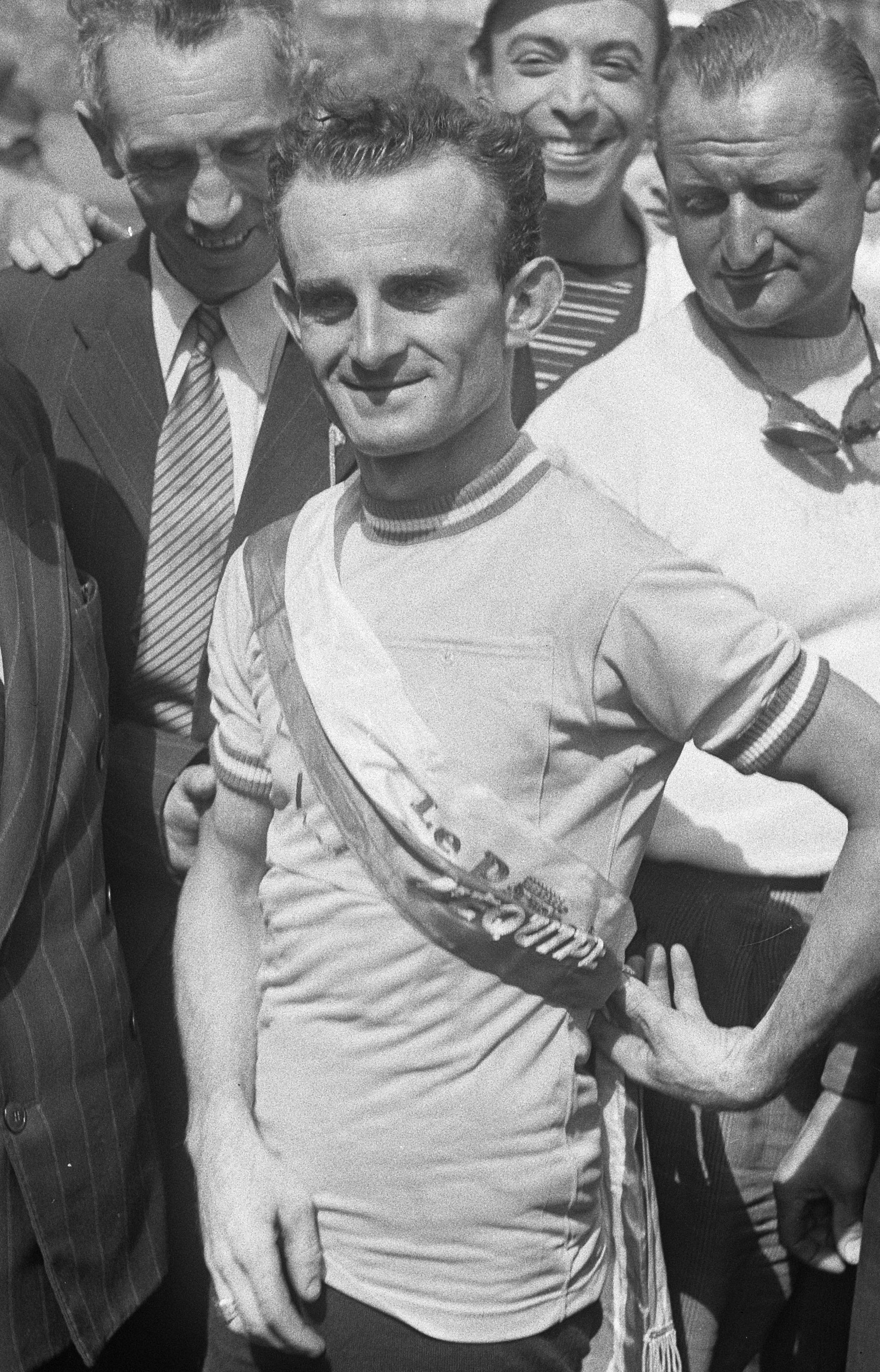 Jean Robic, winnaar van de Tour de France 1947